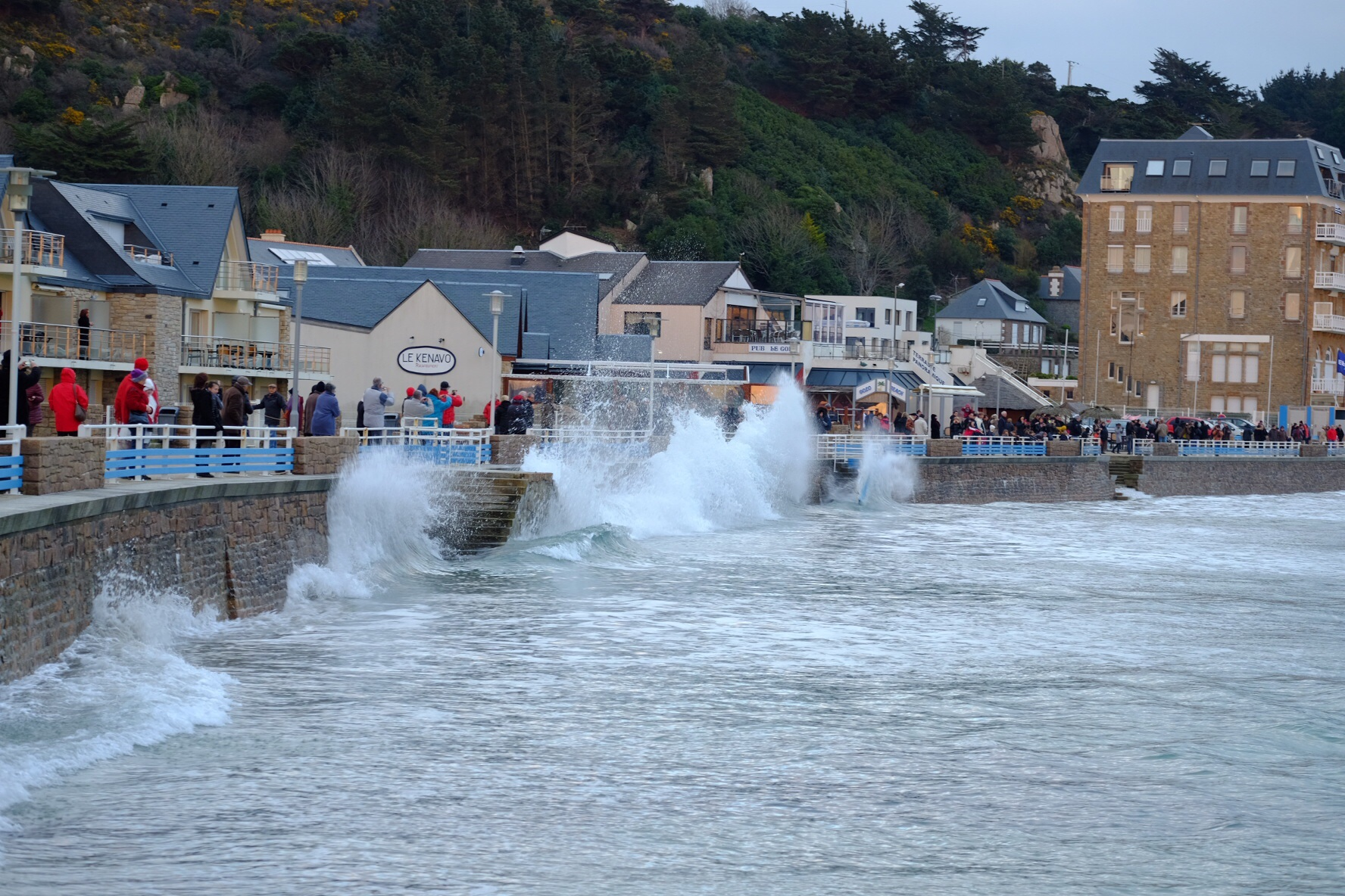 Marée du siècle à Trébeurden, France le 21 mars 2015 19h09